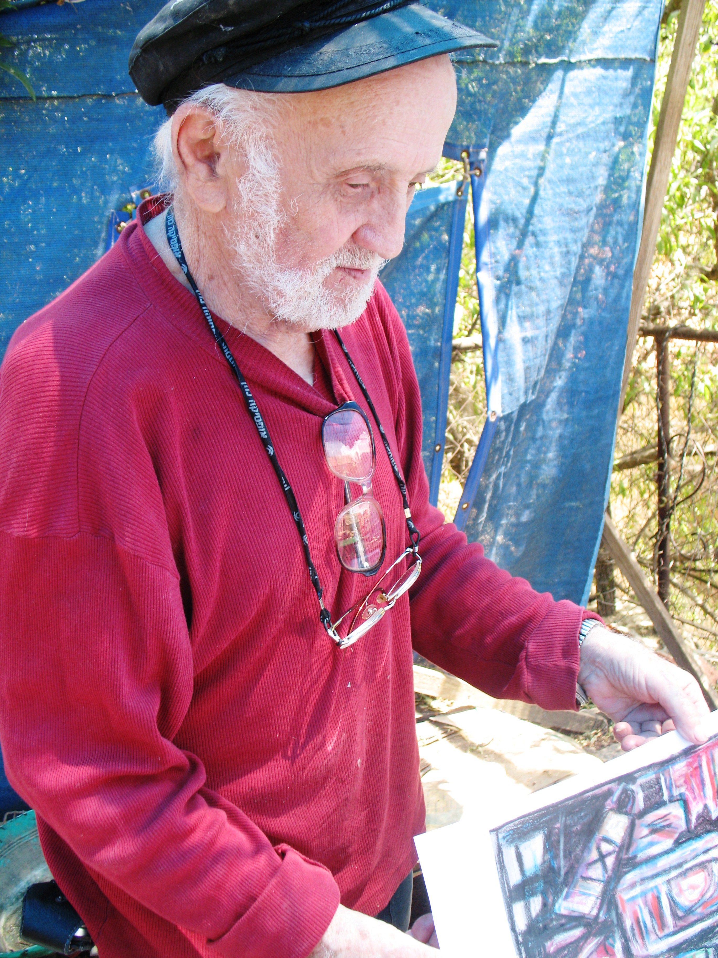 אריה אקשטיין על גג ביתו בראש פינה